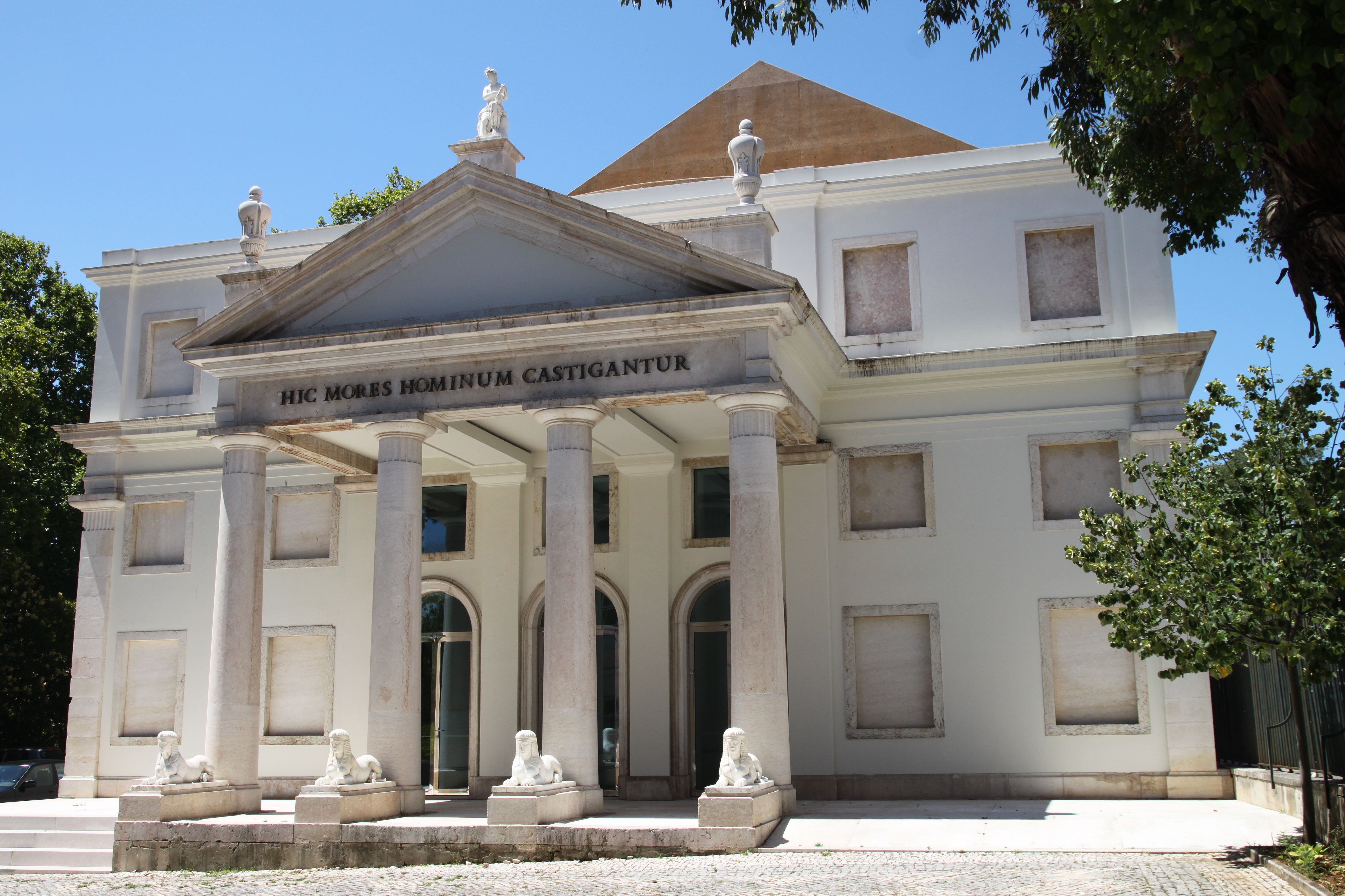 Vista da fachada principal do Teatro Thalia